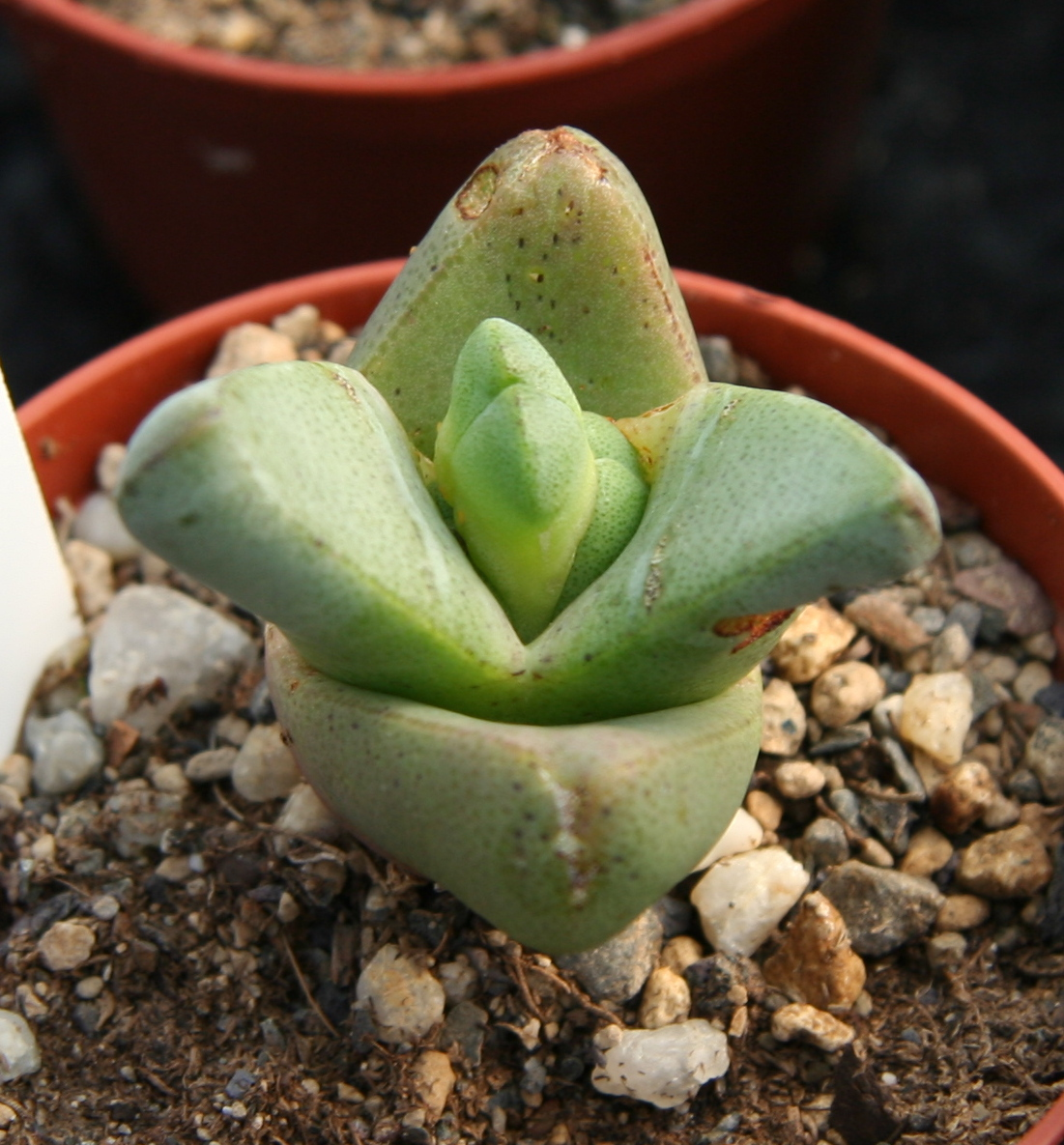 Tanquana prismatica in Kultur bei Kakteen-Haage in Erfurt